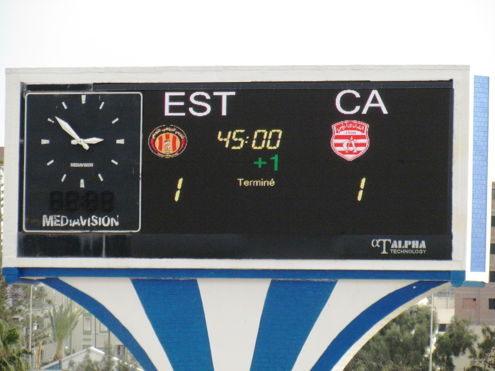 Le tableau d'affichage du stade Stade Mustapha-Ben-Jennet lors du derby tunisois entre l'Espérance sportive de Tunis et le Club Africain le 6 janvier 2019. Le match a vu la victoire de l'EST (2-1).